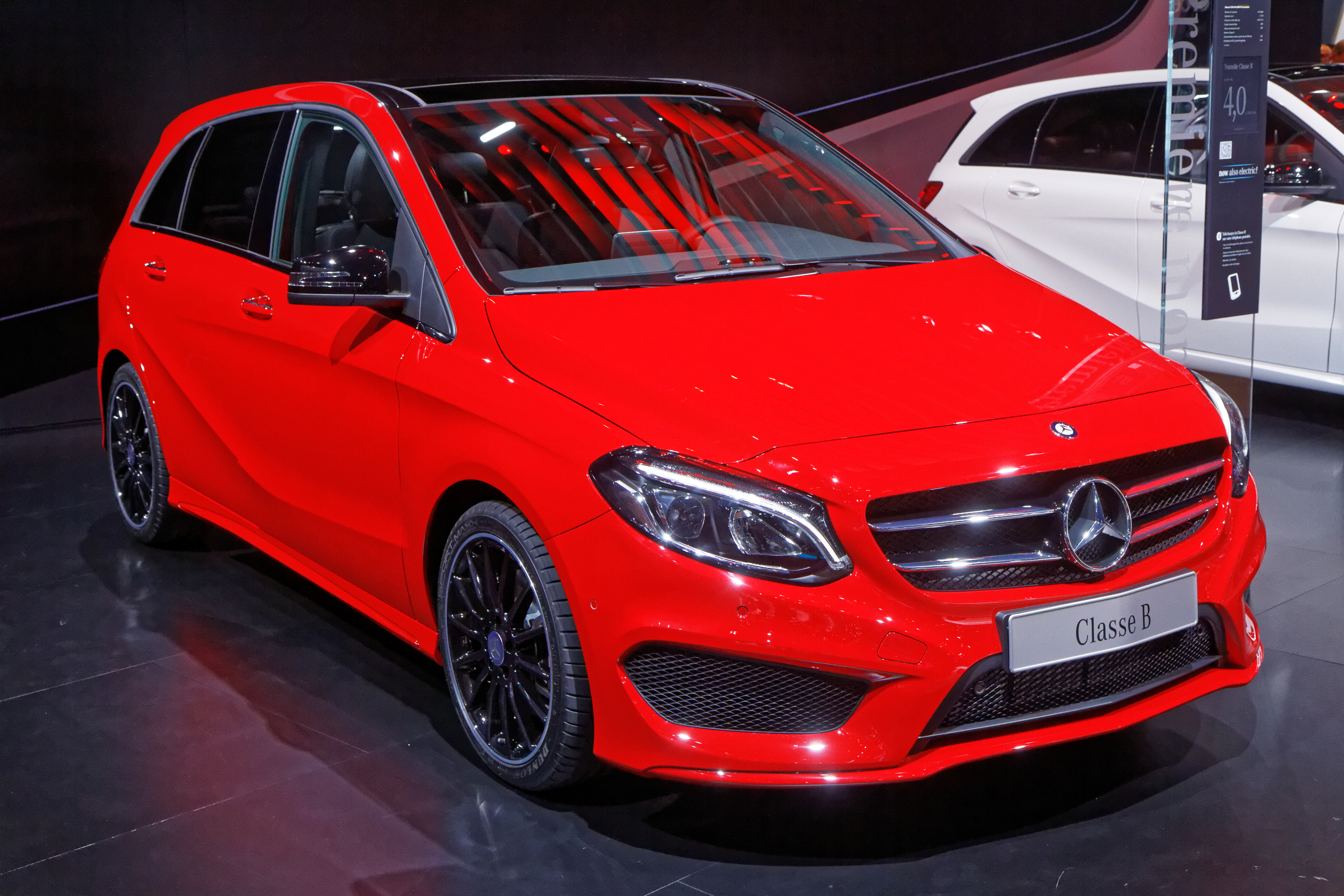 Une Mercedes classe B présentée lors du mondial de l'automobile de Paris 2014.